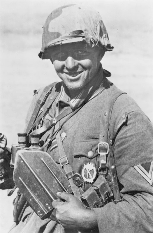 Russland, Kampf um Stalingrad, Infanterist Scherl: Auch er kämpft vor Stalingrad Ein schier unmenschlicher Einsatz wird von den deutschen Soldaten im Kampf um die Festung Stalingrad gefordert. Tag für Tag stossen sie vor und zerschlagen den Feind nun in unerhört erbitterten Häuserkämpfen.- Doch siegessicher und selbstbewusst steht der deutsche Soldat seinen Mann. PK-Aufnahme Kriegsberichter Kaufmann 17.9.42 [Herausgabedatum] ADN-Bildarchiv: II. Weltkrieg 1939-45 An der Front in der Sowjetunion: Anfang September 1942 Soldat der deutschen Wehrmacht, der in den schweren Kämpfen um Stalingrad im Einsatz ist - noch ist man siegessicher 5240-42 [Sowjetunion.- Schlacht um Stalingrad]